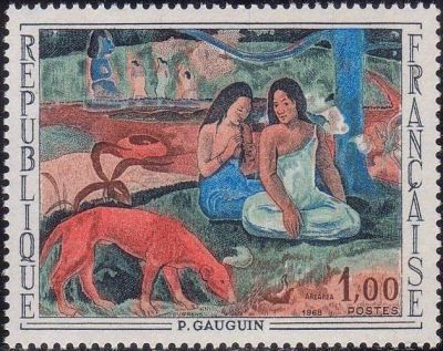 Timbre commémoratif